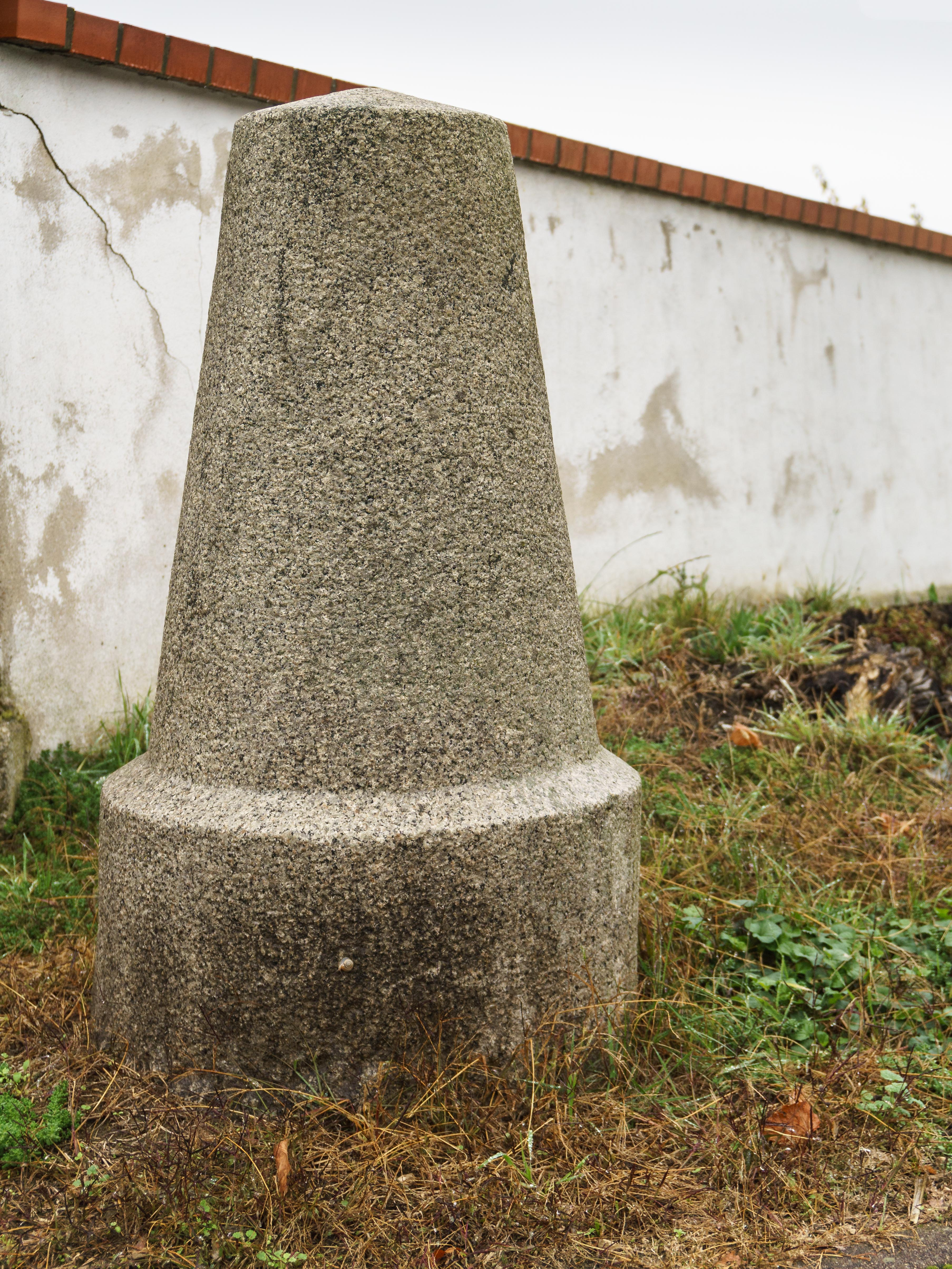 Preußischer Rundsockelstein (0603) an der L 9, Einmündung Dequede Straße in Osterburg (Altmark) OT Krevese.